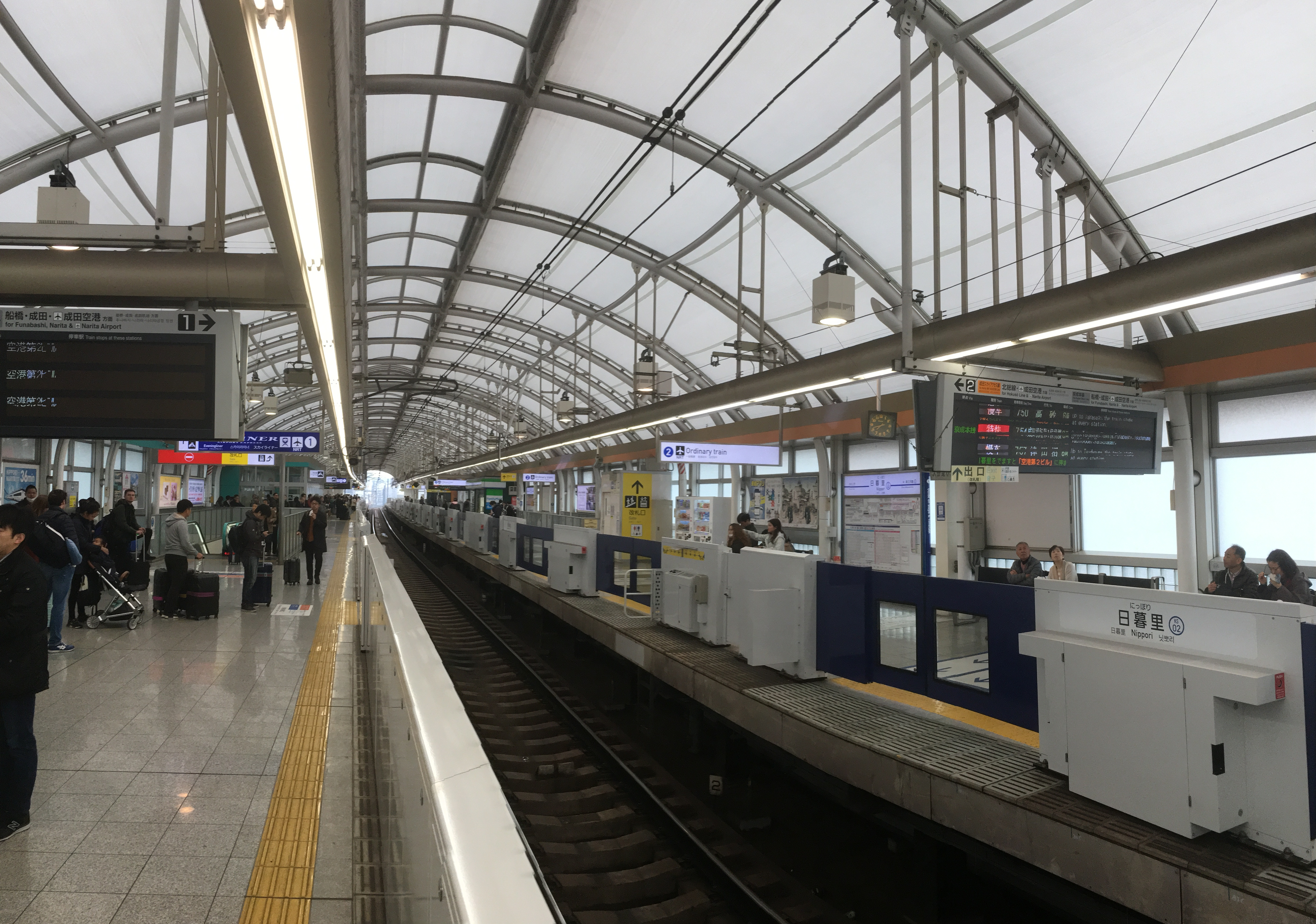 京成日暮里駅のホーム (Keisei Nippori Station platforms)